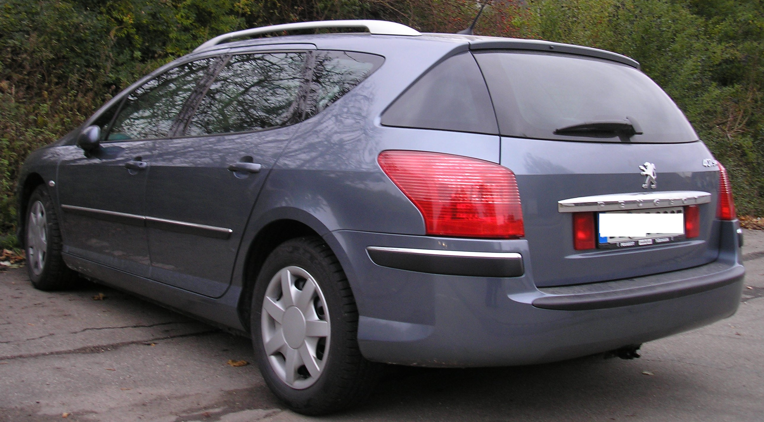 Peugeot 407 SW 2005